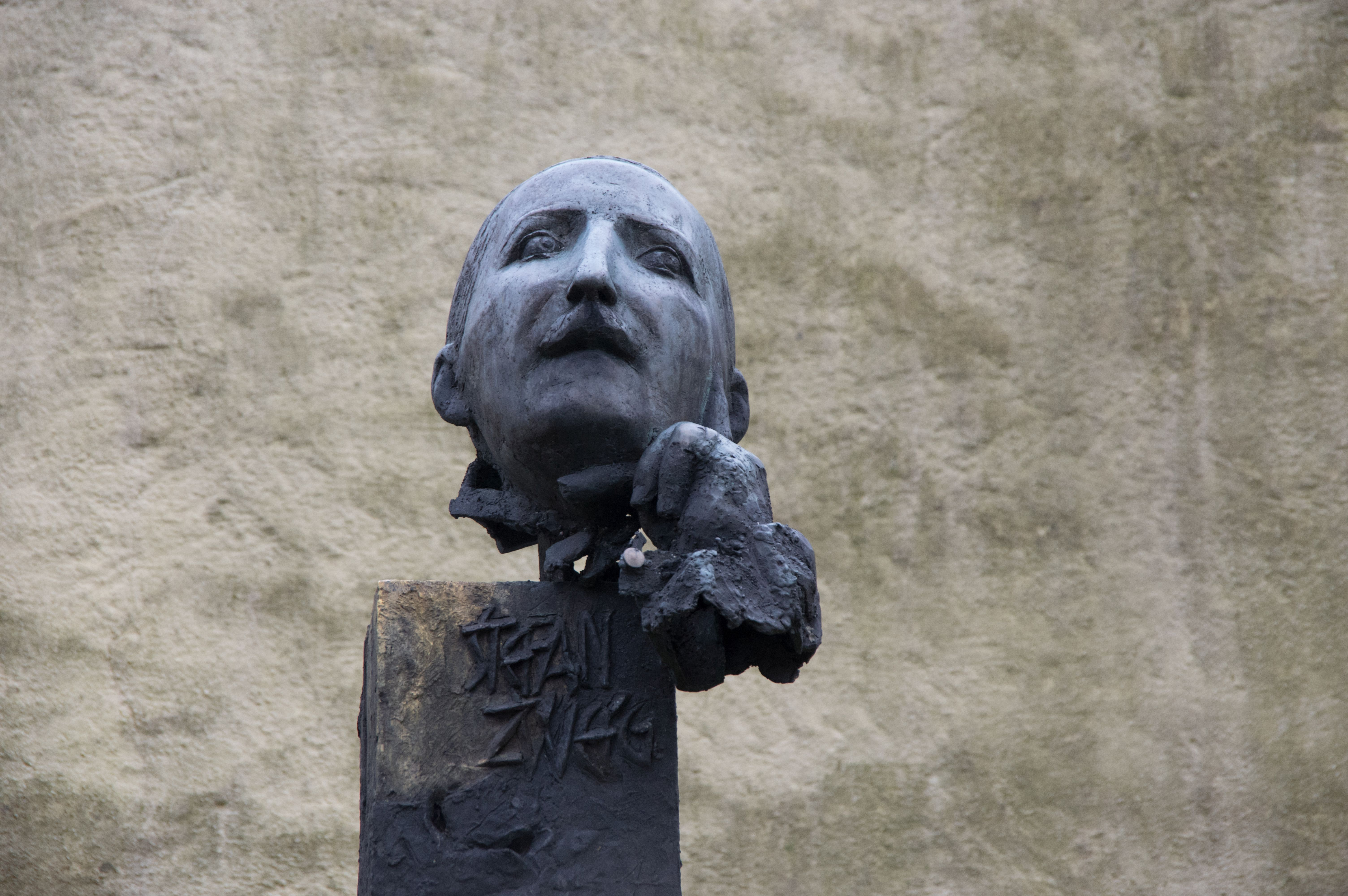 Salzburg in Österreich. Die Bürste von Stefan Zweig befindet sich auf dem Kapuzinerberg.